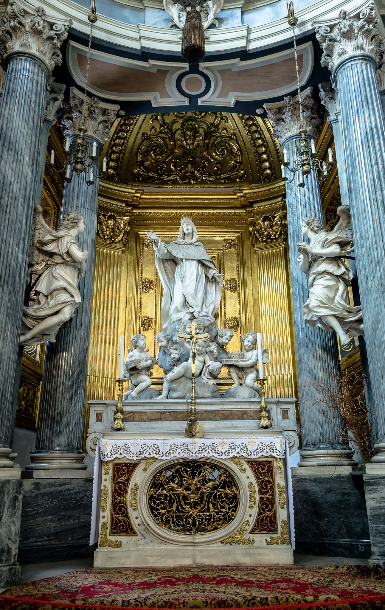 Katedra św. Jana Chrzciciela we Wrocławiu - kaplica św. Elżbiety